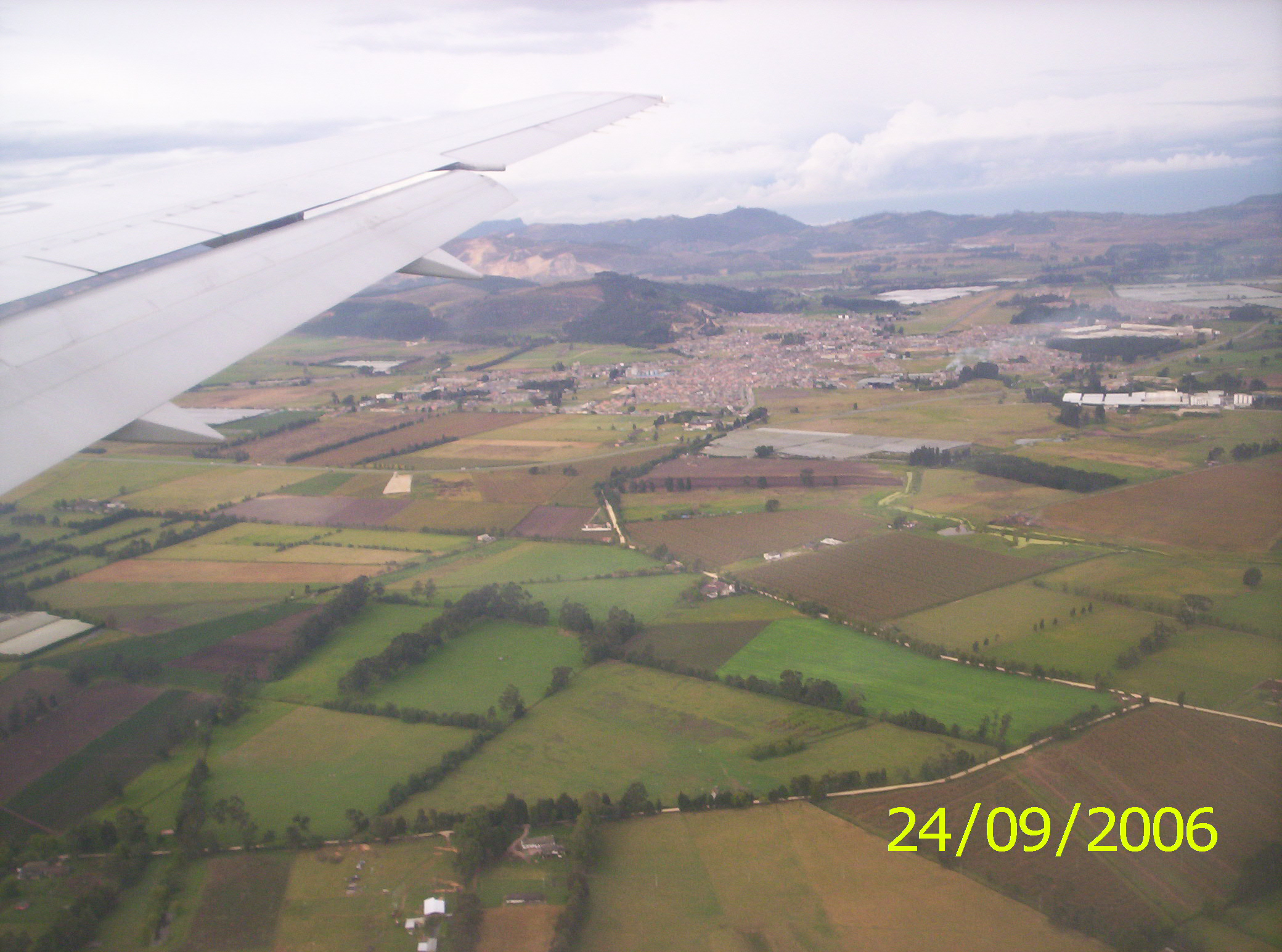 Photo taken before just before landing in Bogotá. Sabana de Bogotá.